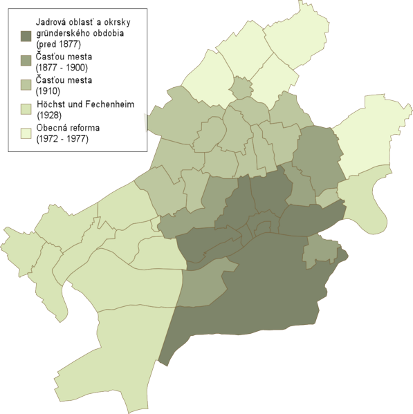 Pričleňovanie mestských častí k Frankfurtu